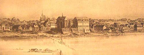 Panorama Solca z praskiego brzegu.